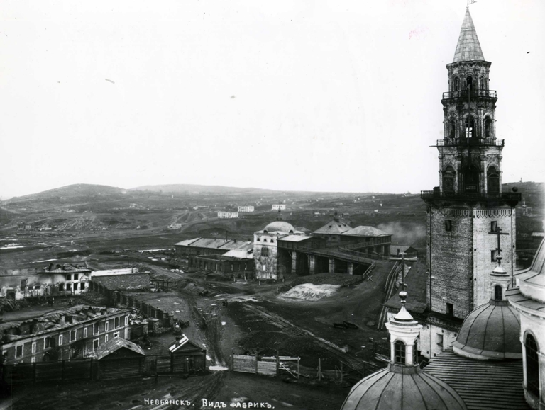 Невьянский завод Вид с колокольни Спасо-Преображенского собора. Нач. ХХ века.